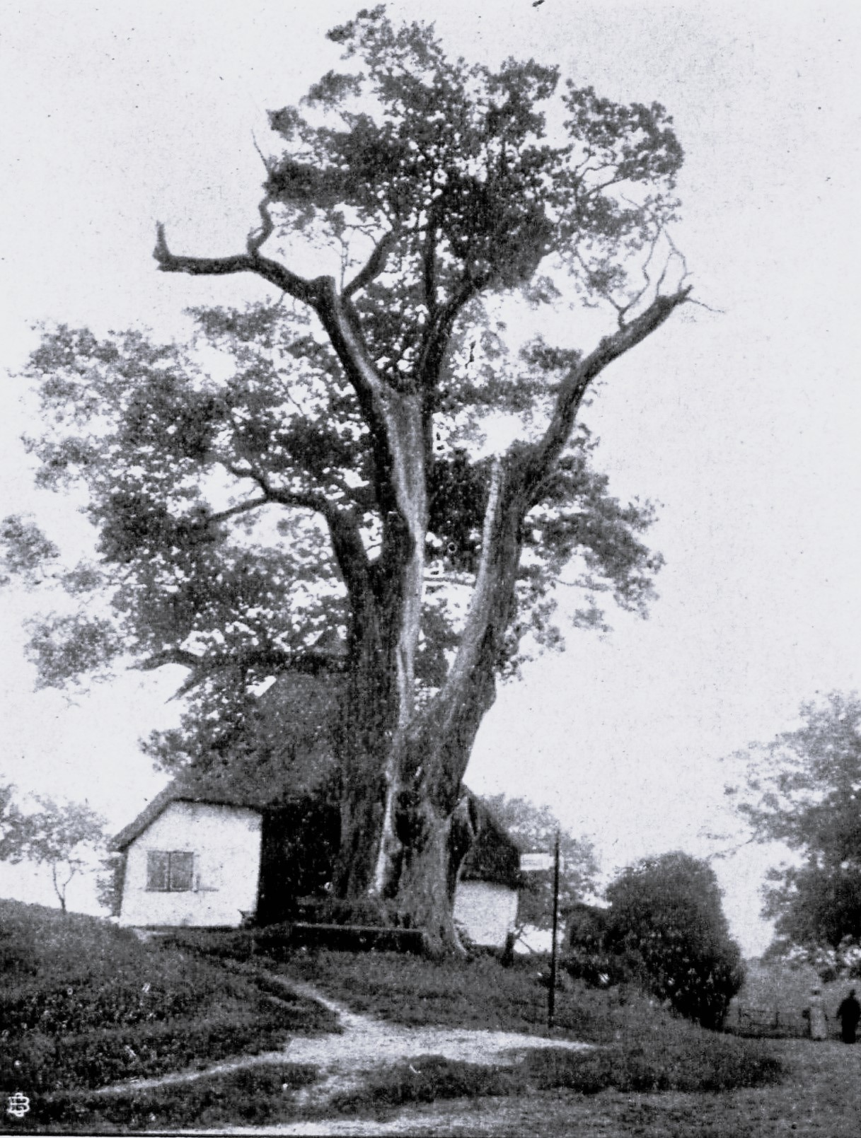 Alte Eiche nach Blitzeinschlag 1907